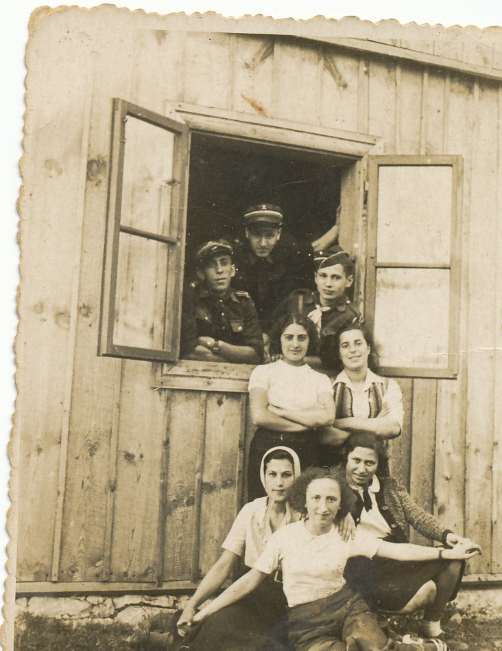 אנשי בית"ר בפולין